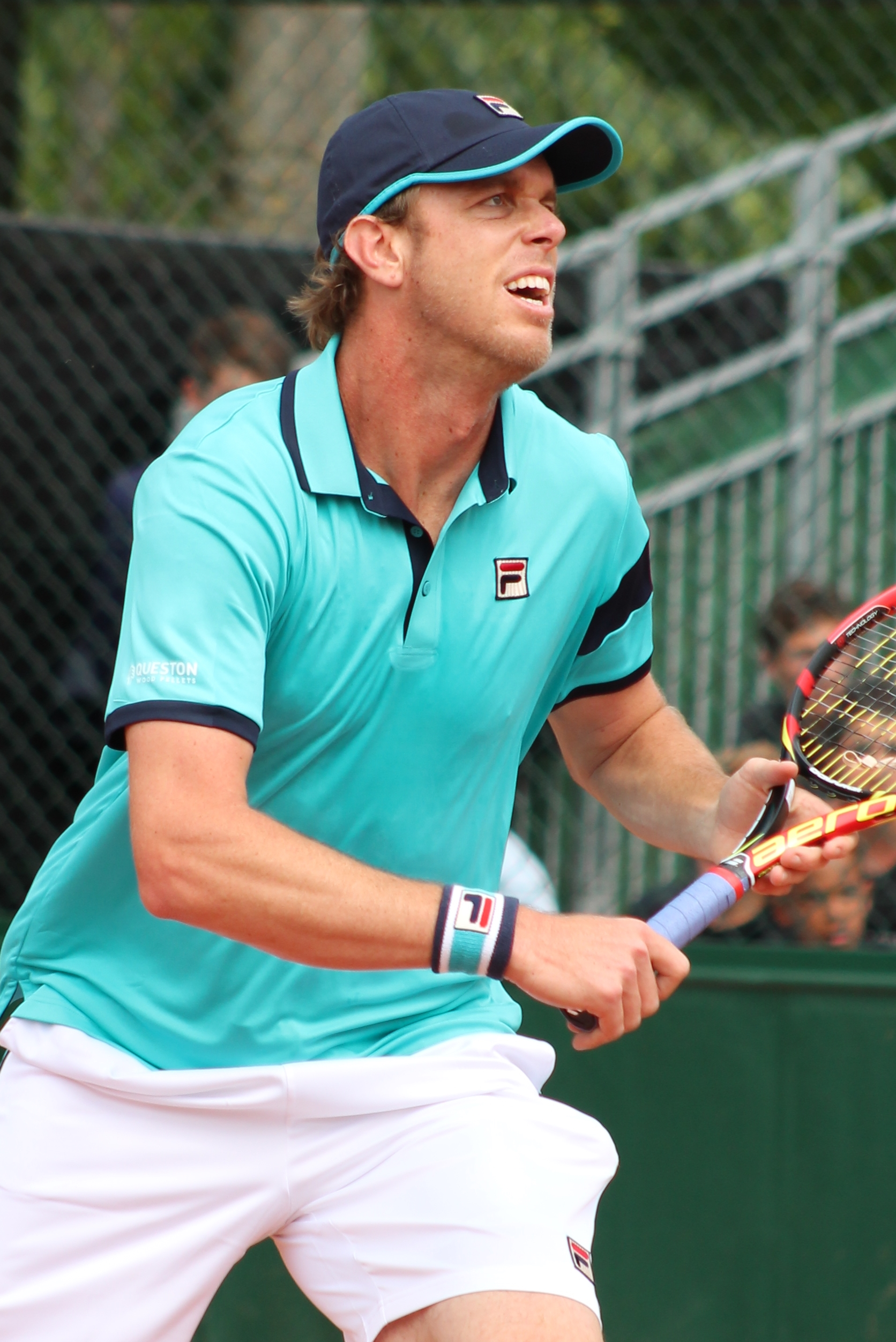 Querrey RG15